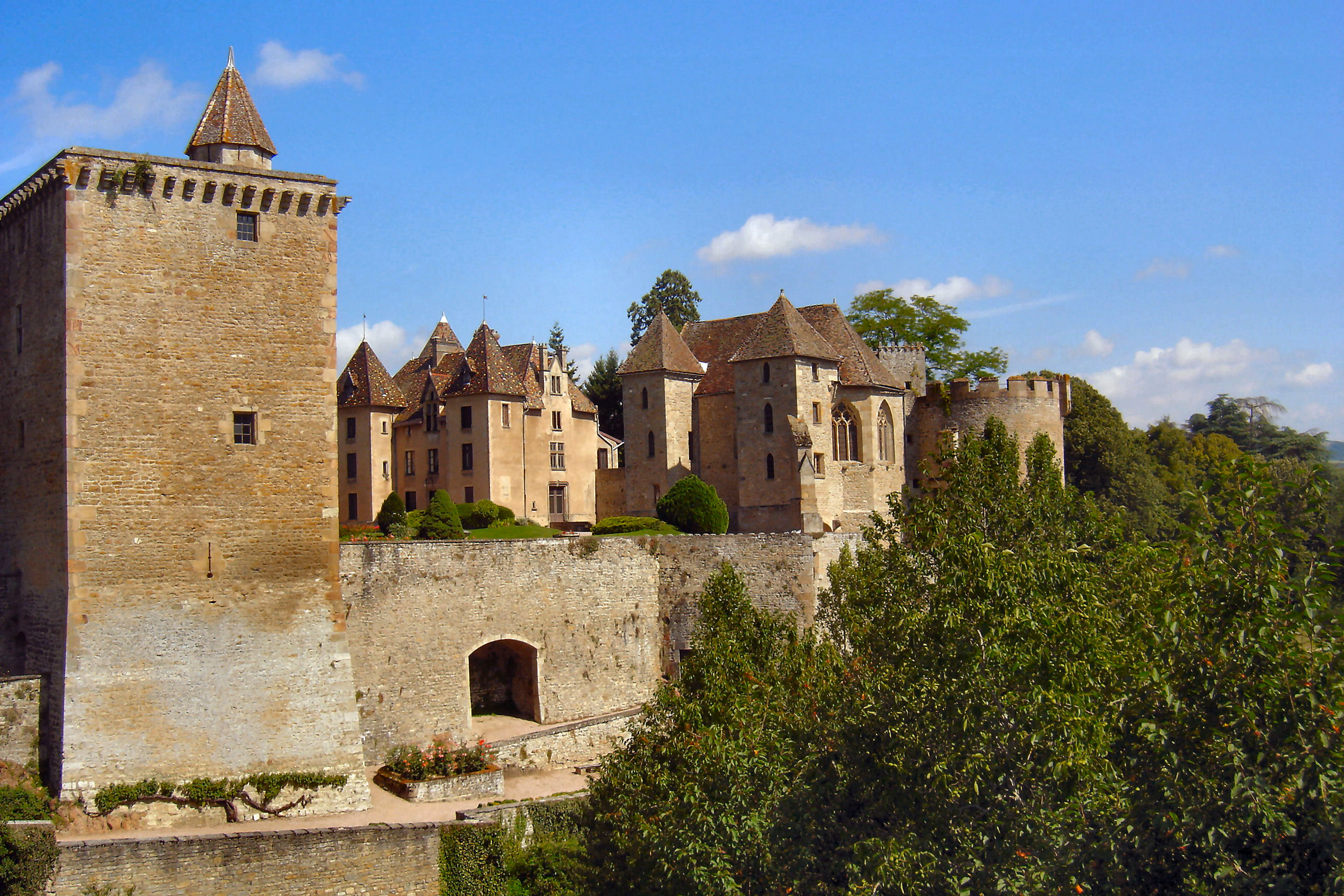 Chateau de couches